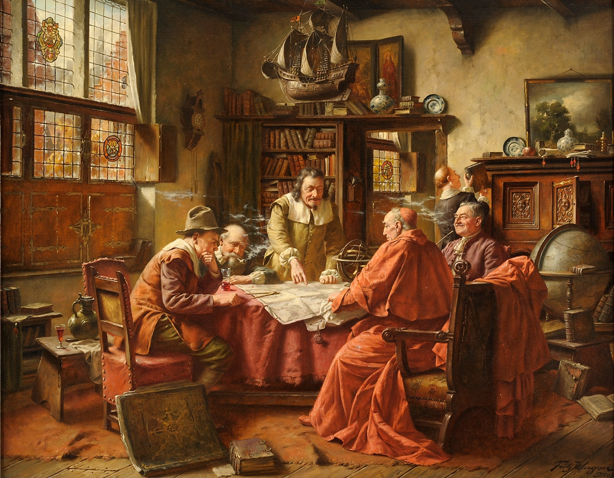 Herrenrunde mit Landkarte (angeboten als Die Gelehrtenrunde). Signiert. Öl/Lwd., 90 x 116 cm.